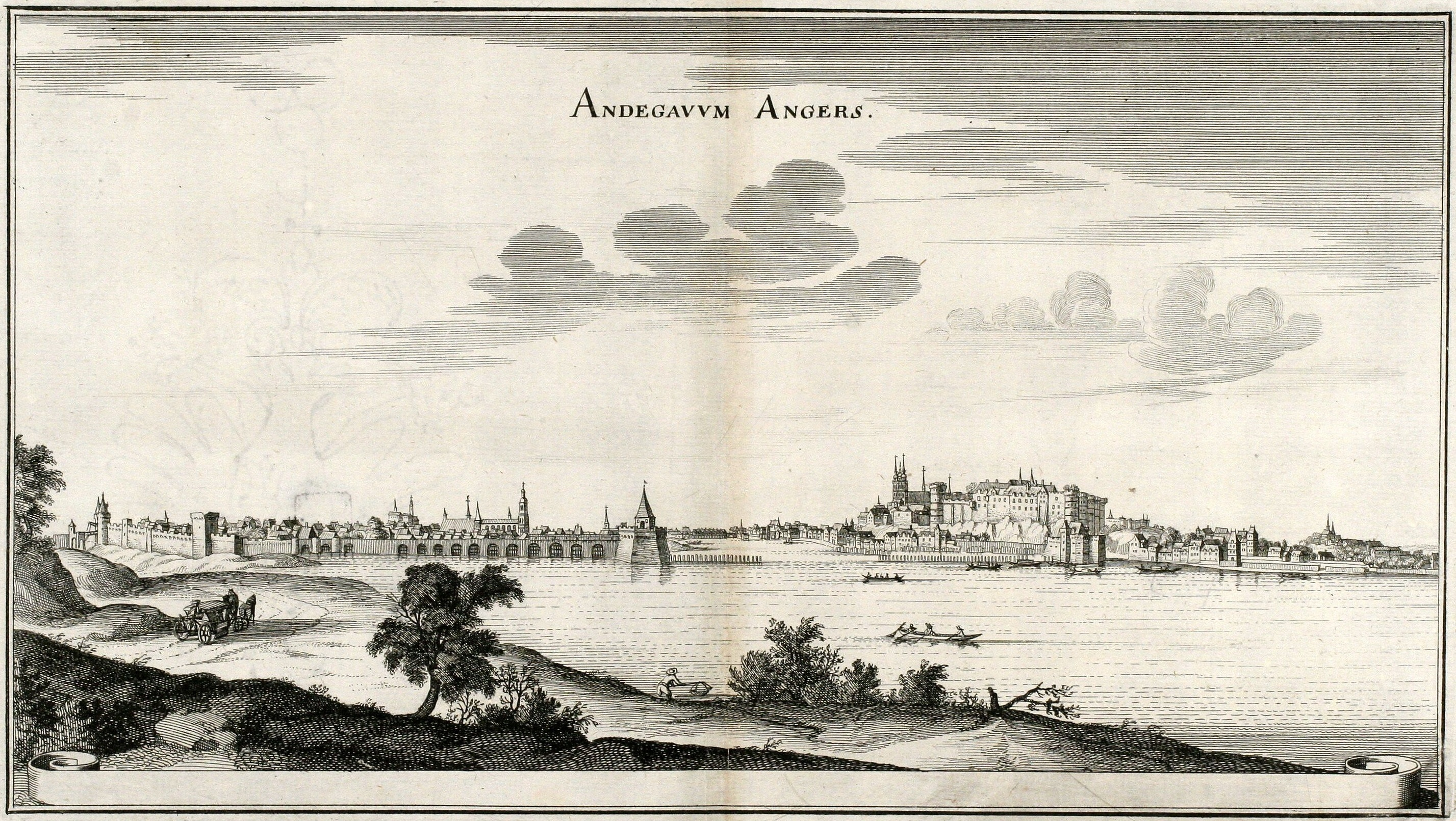 Kupferstich mit einer Ansicht der Stadt Angers aus der Topographia Galliae